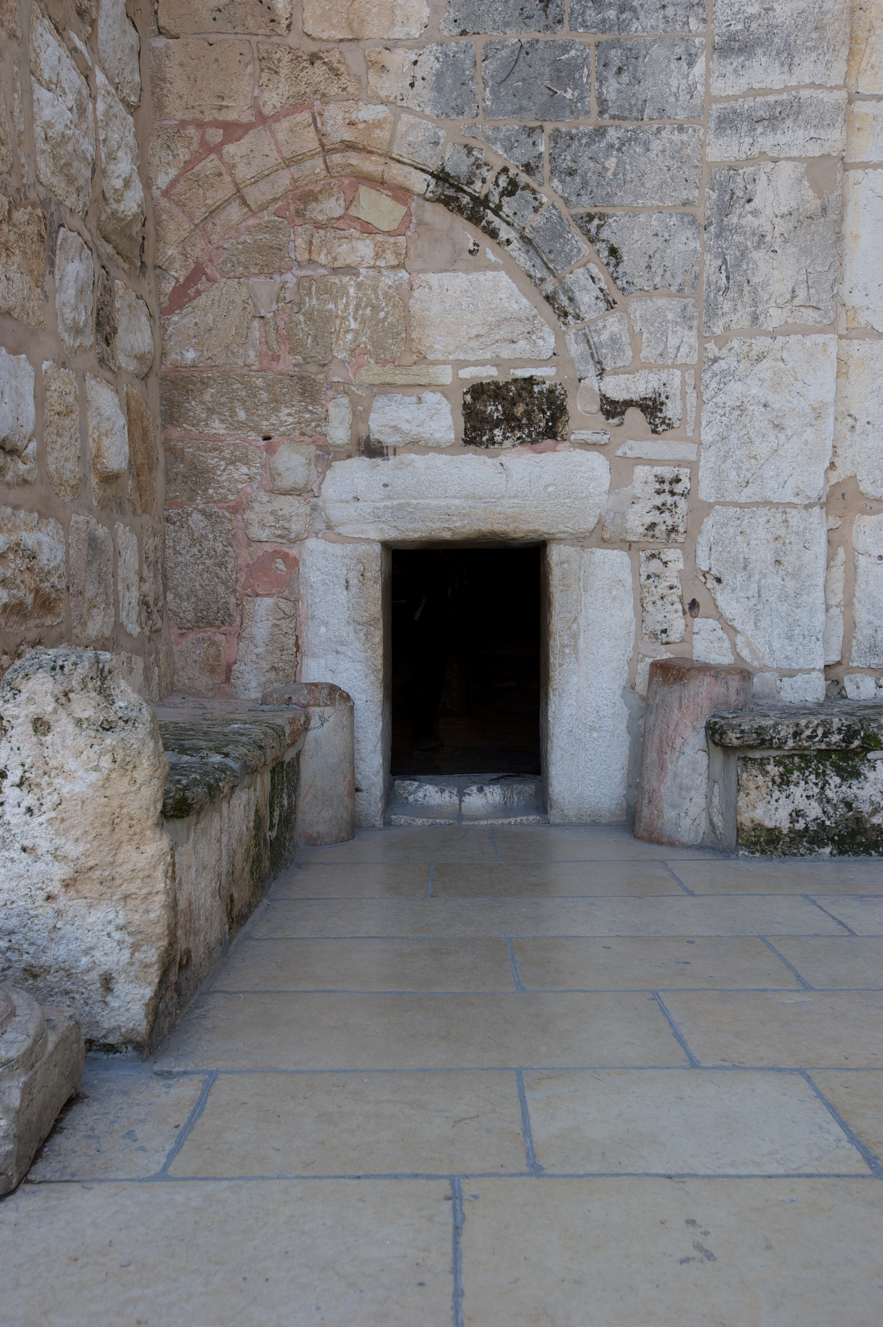 Bethlehem - Eingang zur Geburtskirche über der Geburtsgrotte